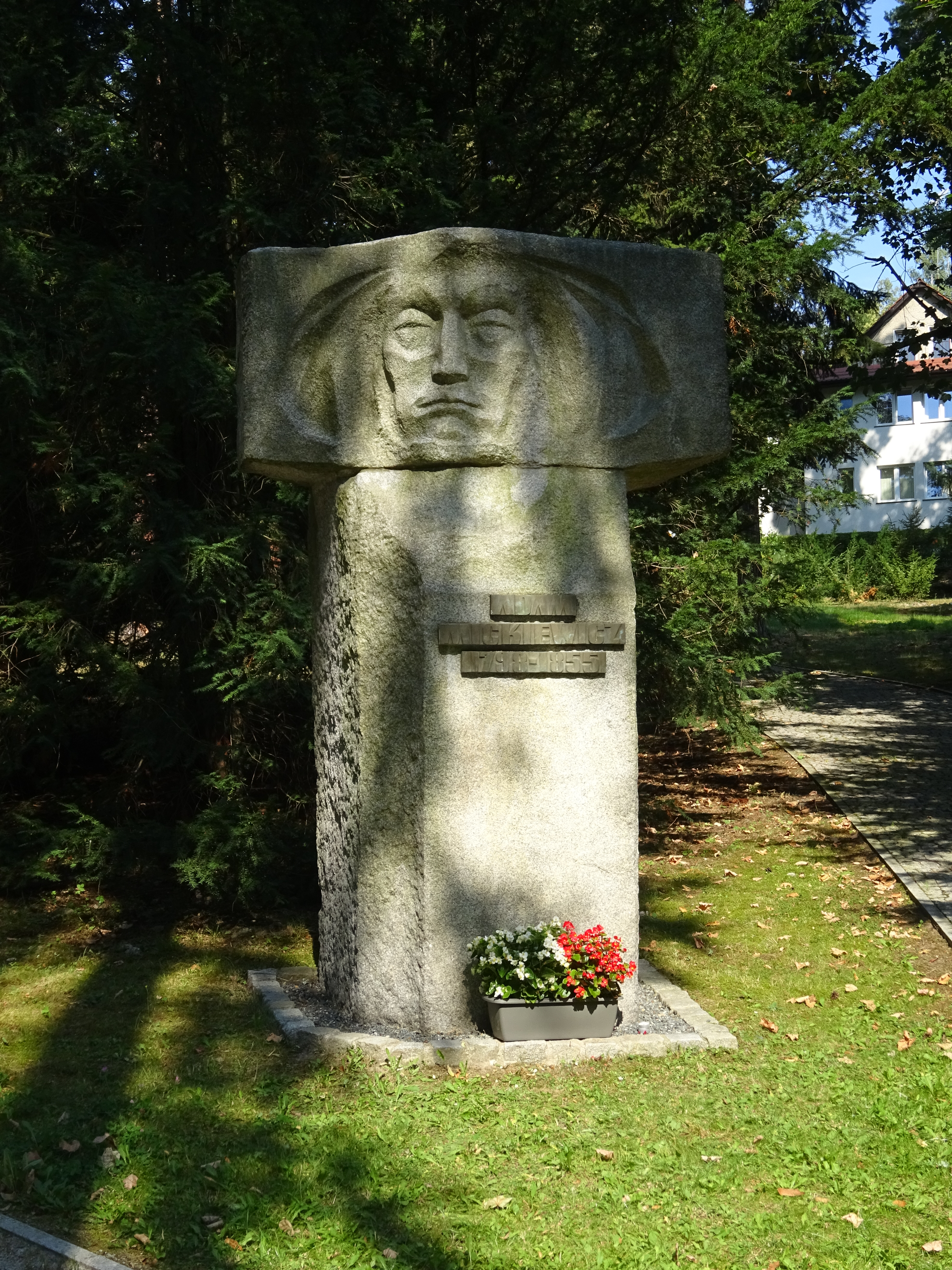 Pomnik Adama Mickiewicza w Polanicy Zdroju autorstwa Władysława Tumkiewicza z 1969